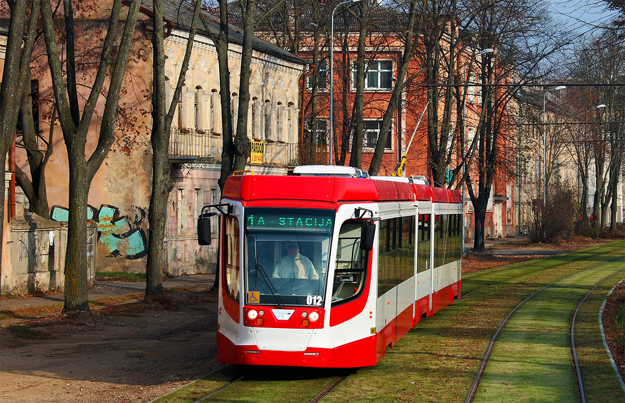 Jaunais 71-631 tramvajs 1. maršrutā